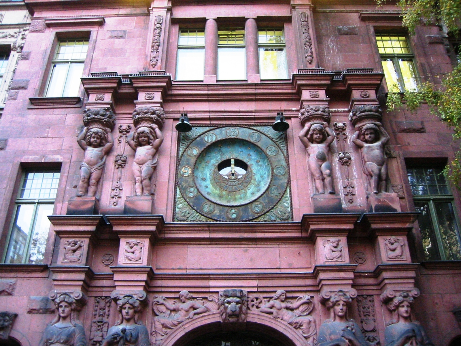 Gebäude der ehemaligen Viktoria-Versicherung in der Lindenstraße in Berlin-Kreuzberg: Astronomische Uhr im Hof I, Nachbildung aus dem Ulmer Rathaus